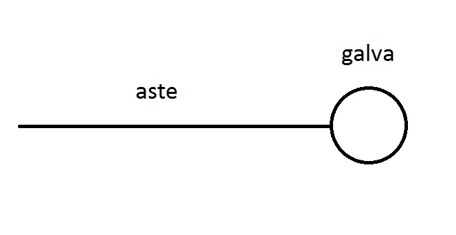 Virsmaktīvas vielas molekulas shematisks attēls.